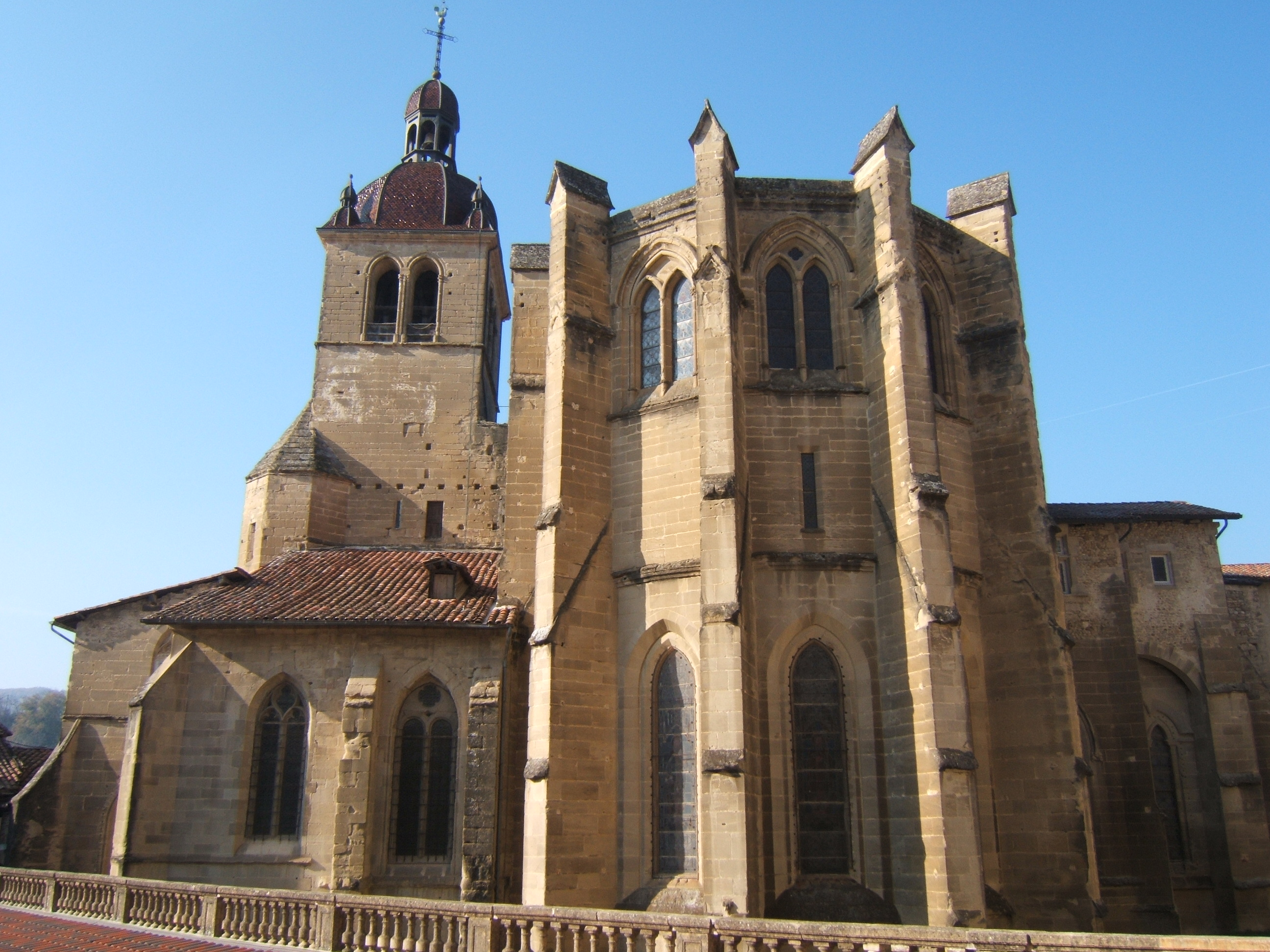 Arrière de l'Eglise Abbatiale de St Antoine l'Abbaye